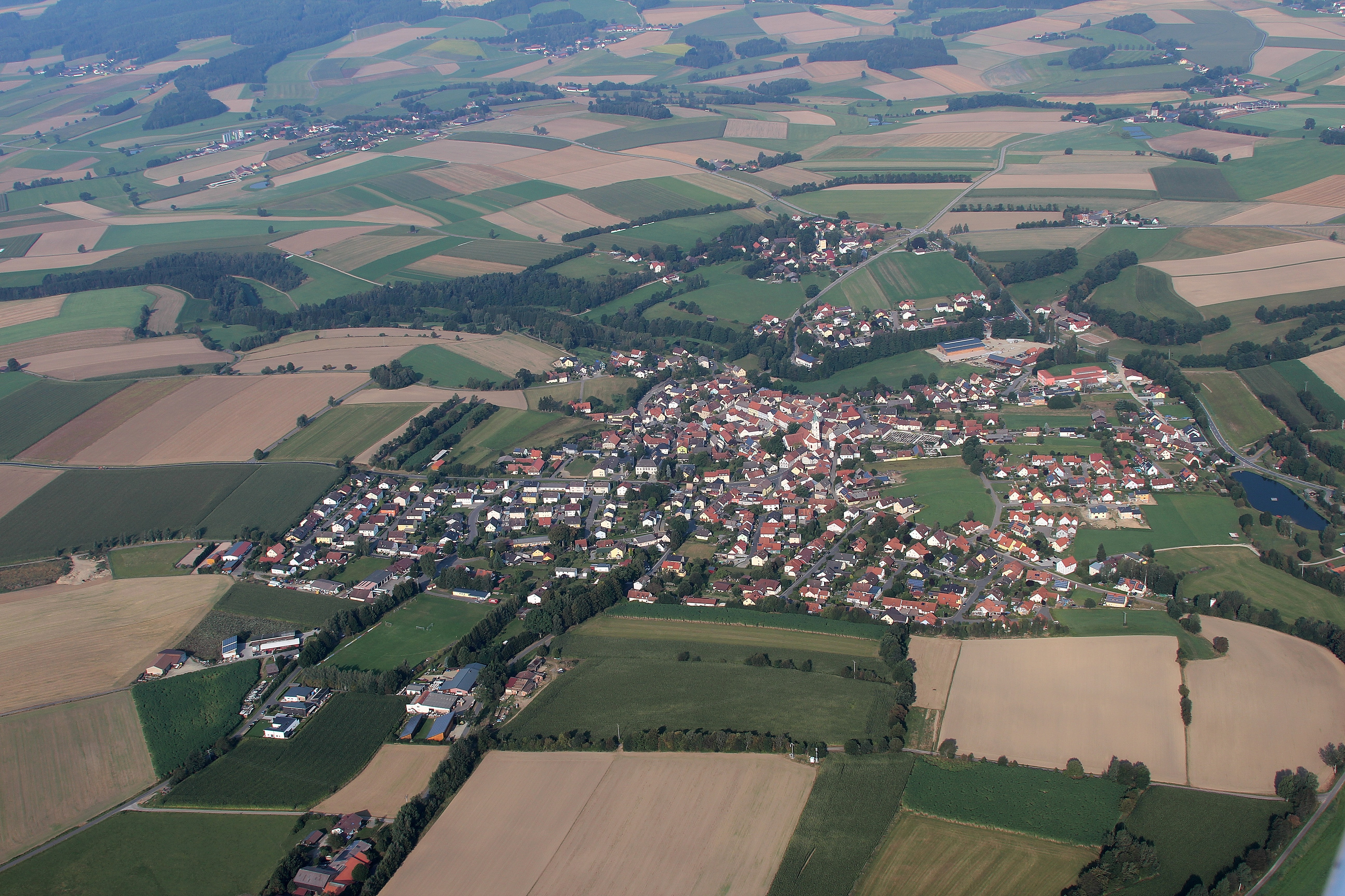 Waldthurn, im Hintergrund Lennesrieth; Gemeinde Waldthurn, Landkreis Neustadt an der Waldnaab, Oberpfalz, Bayern